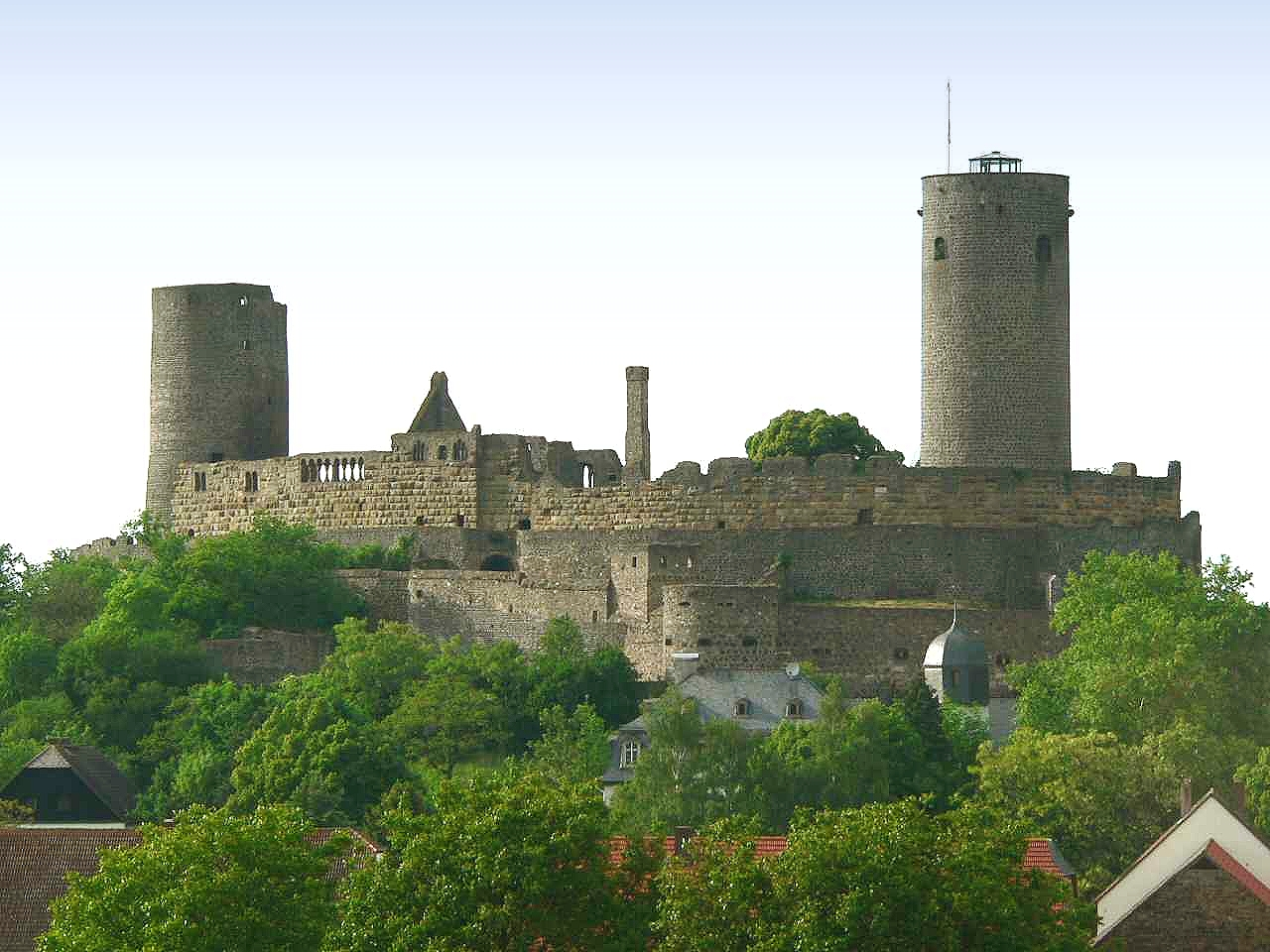 Burgruine Münzenberg, Hessen, Germany